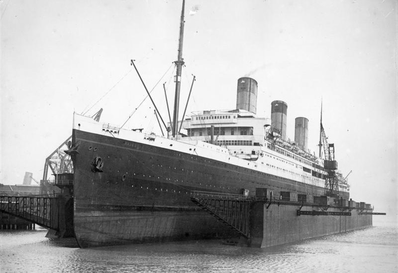 Was Deutschland an Reparationen geleistet hat ! Ein interessanter Ueberblick über die bisher geleisteten Sachlieferungen Deutschlands auf Reparations-Conto. Der auf Grund des Reparationsabkommens an England abgelieferte 60.000 to Dampfer "Deutschland", jetzt "Majestic" in dem von Deutschland auf Reparationsconto erbauten Riesen-Schwimmdock im Hafen von South-Hampton.